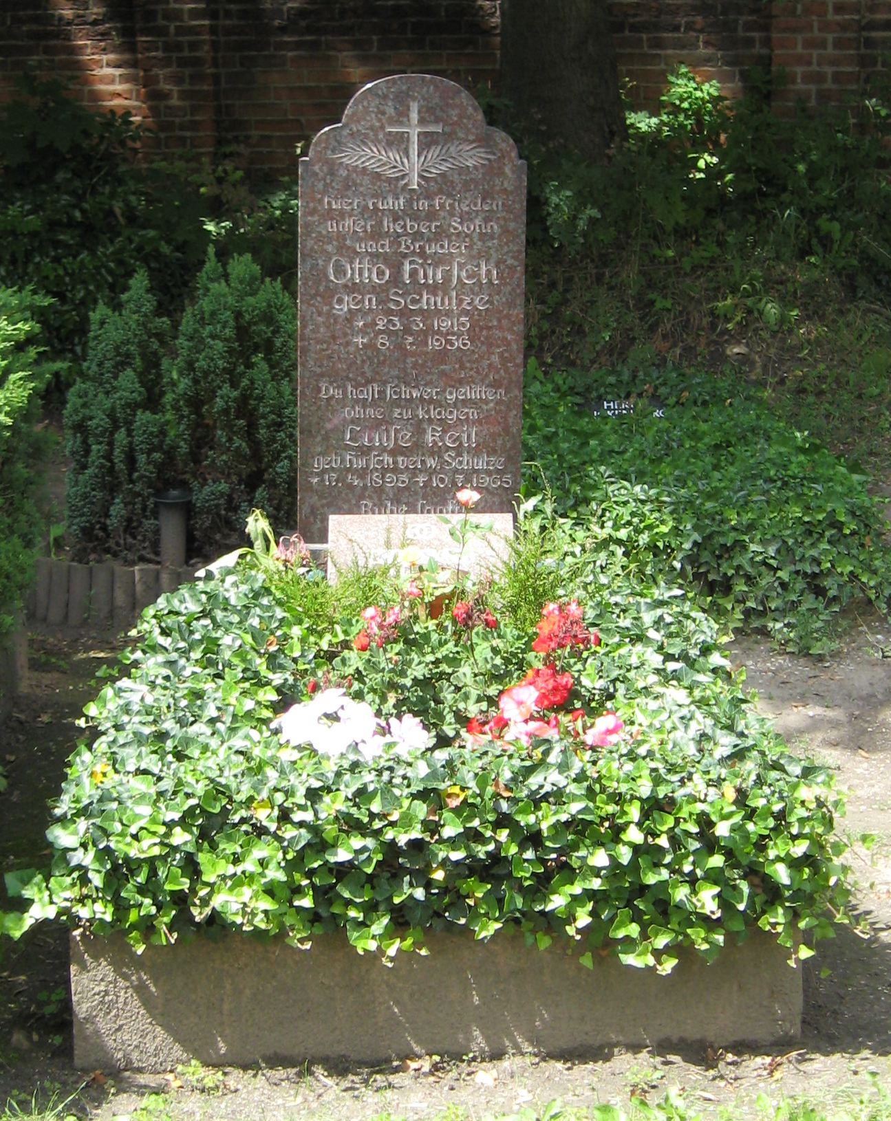 Grabstein auf dem Friedhof der Dorfkirche Böllberg in Halle (Saale), an der Straße der Romanik.